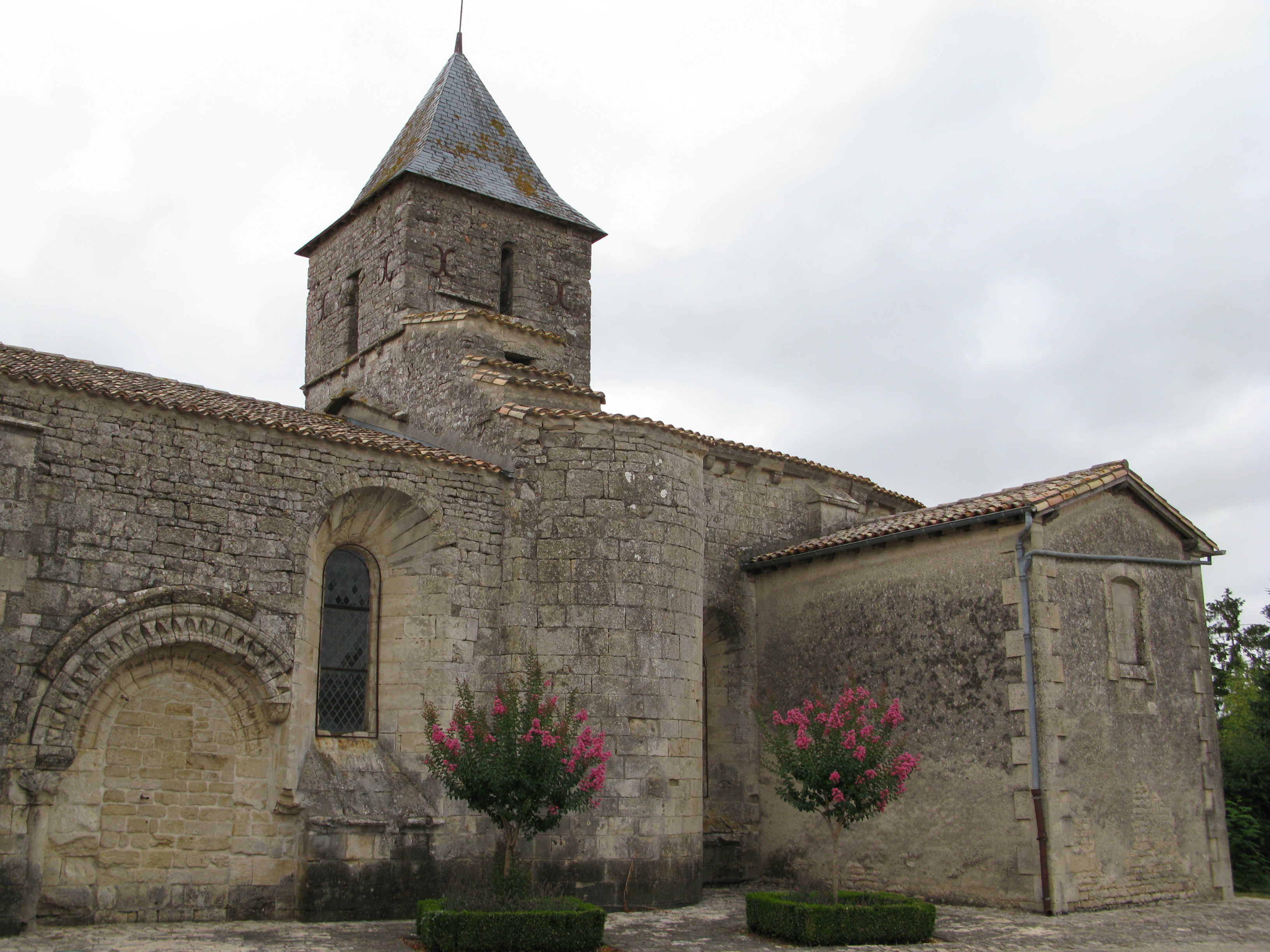 L'église de Sciecq